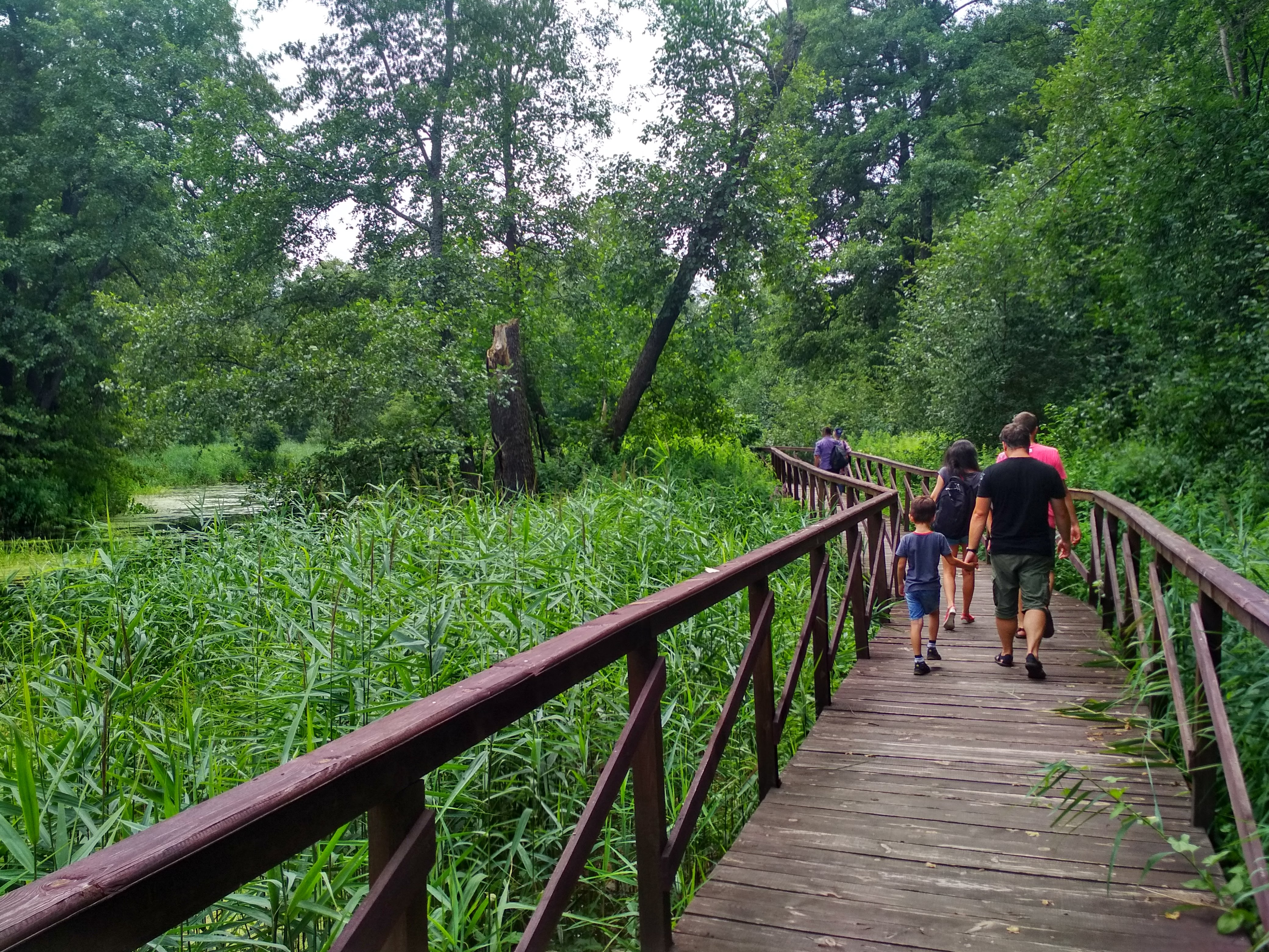 Воронежский заповедник: Территория заповедника расположена на границе Воронежской (Верхнехавский р-н) и Липецкой (Усманский р-н) областей и занимает северную половину островного лесного массива – Усманского бора., Верхнехавский район, Воронежская область This image is related to the protected area of Russia number 3600069